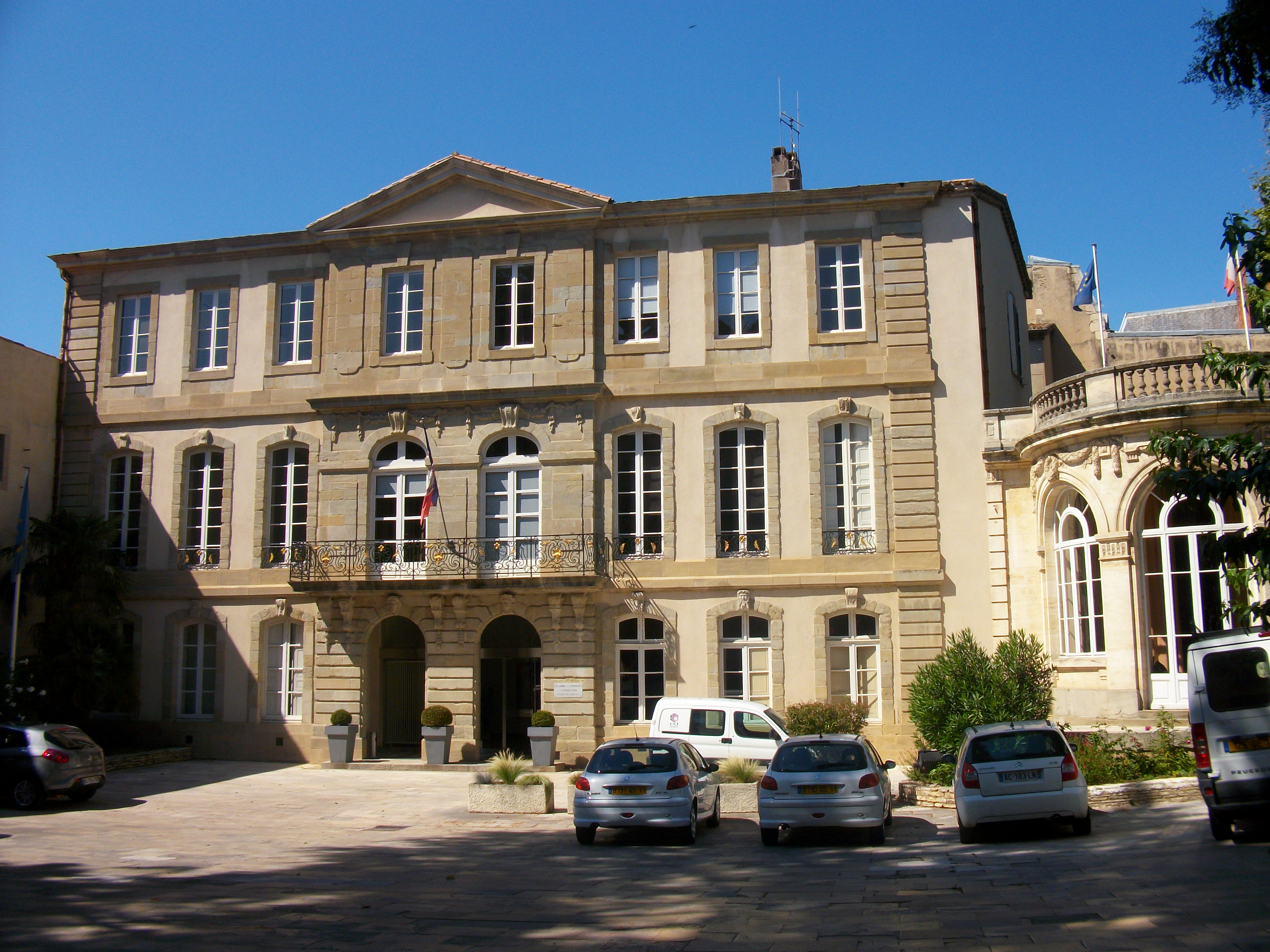 L'hôtel de Murat (XVIIIe siècle) est situé dans la bastide Saint Louis à Carcassonne. Il abrite le siège de la CCI Aude.